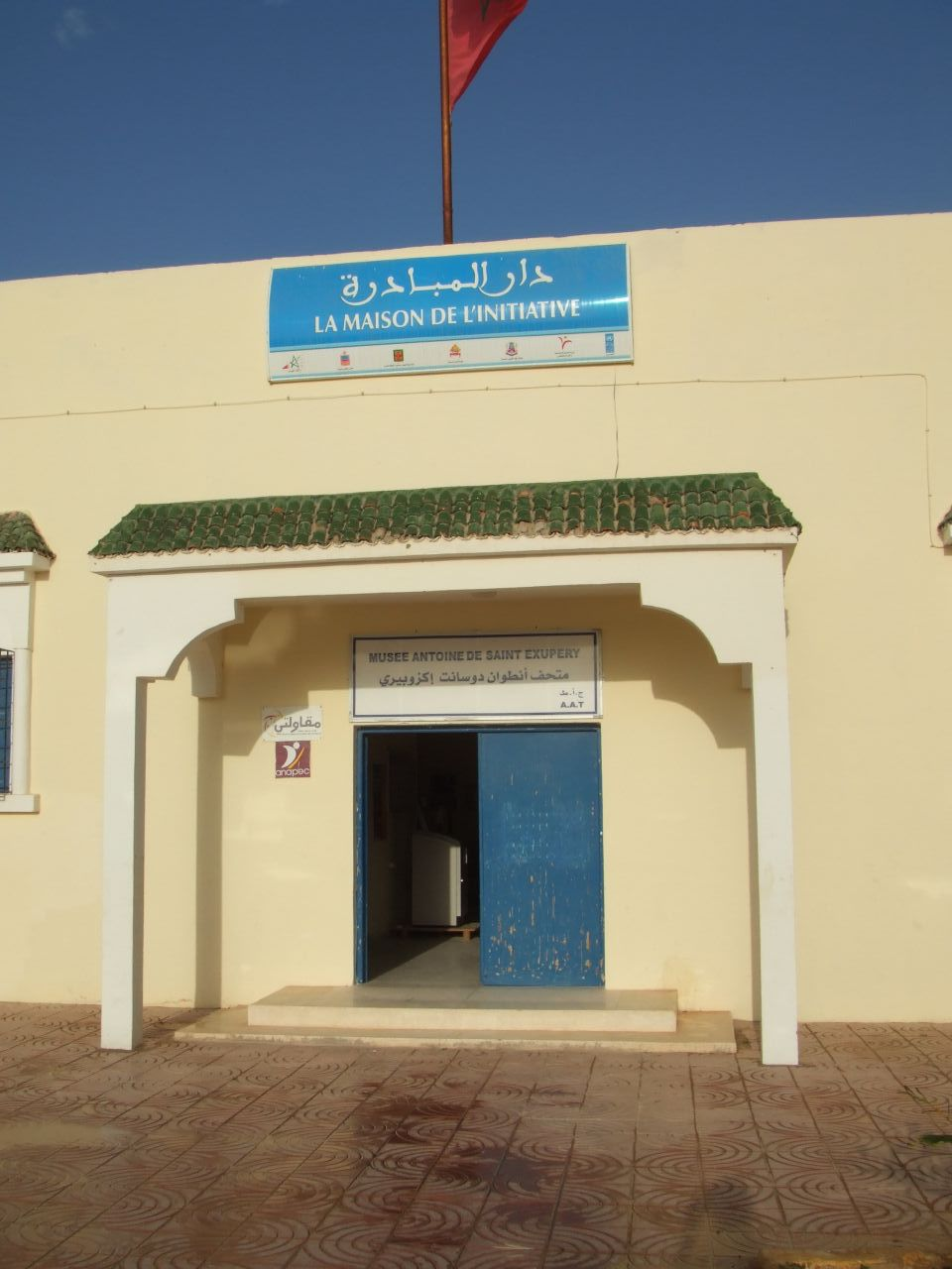 Museo Antoine de Saint-Exupéry en Tarfaya (Marruecos).